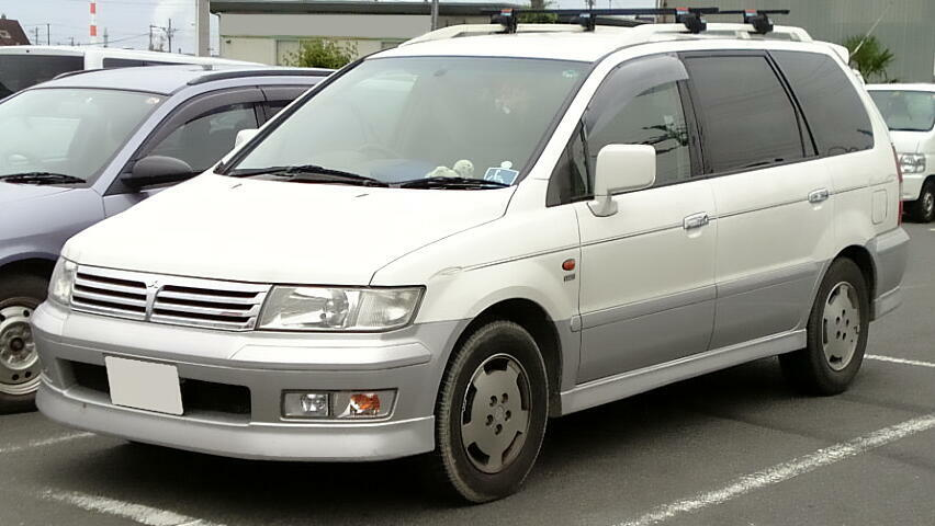 三菱・シャリオグランディス（前期型）